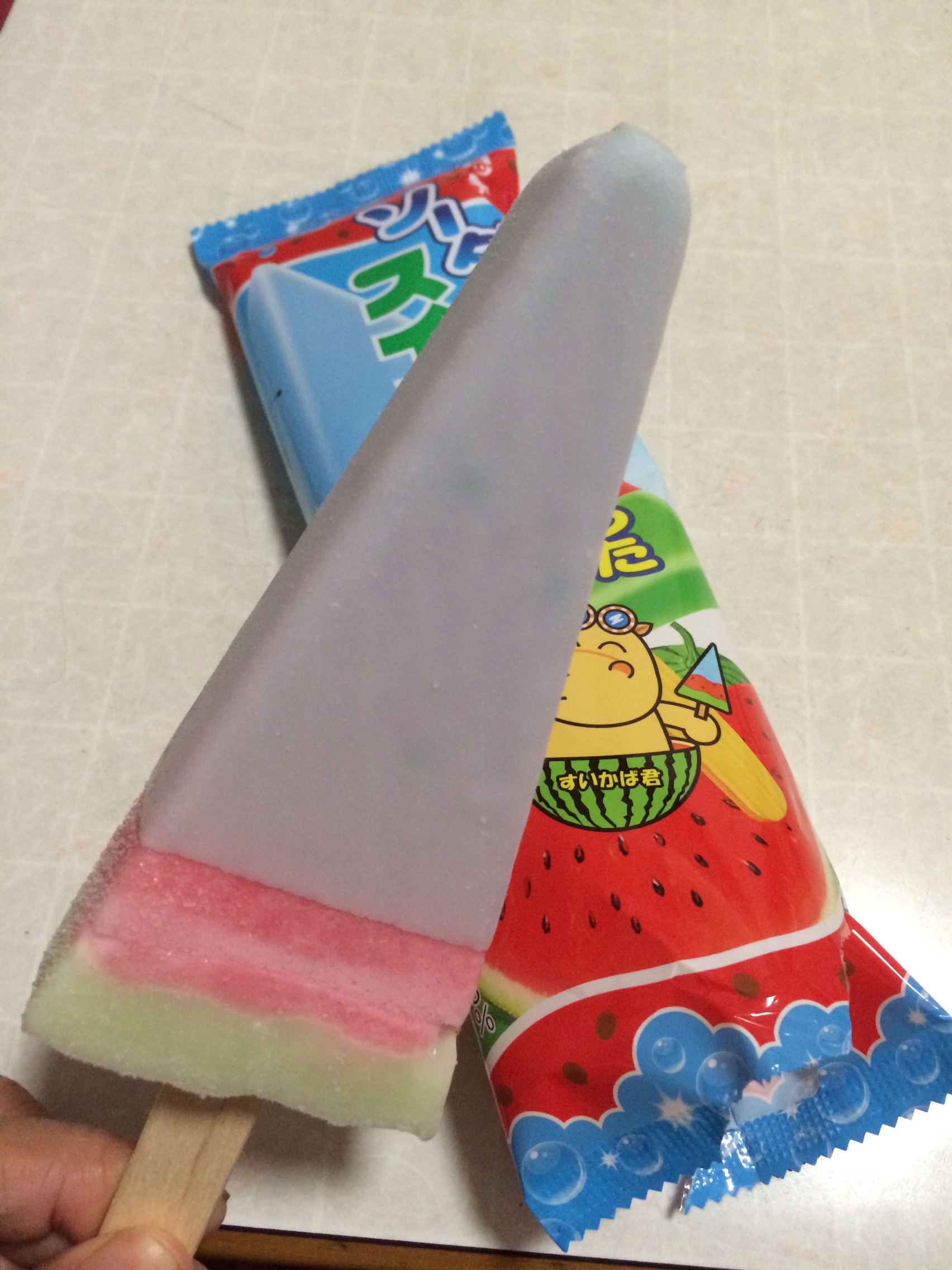 Lotte 『ソーダ！？かけちゃったスイカバー』 2014年4月7日(月)より全国で発売 ～ 食べないと分からないマッチング！ ～